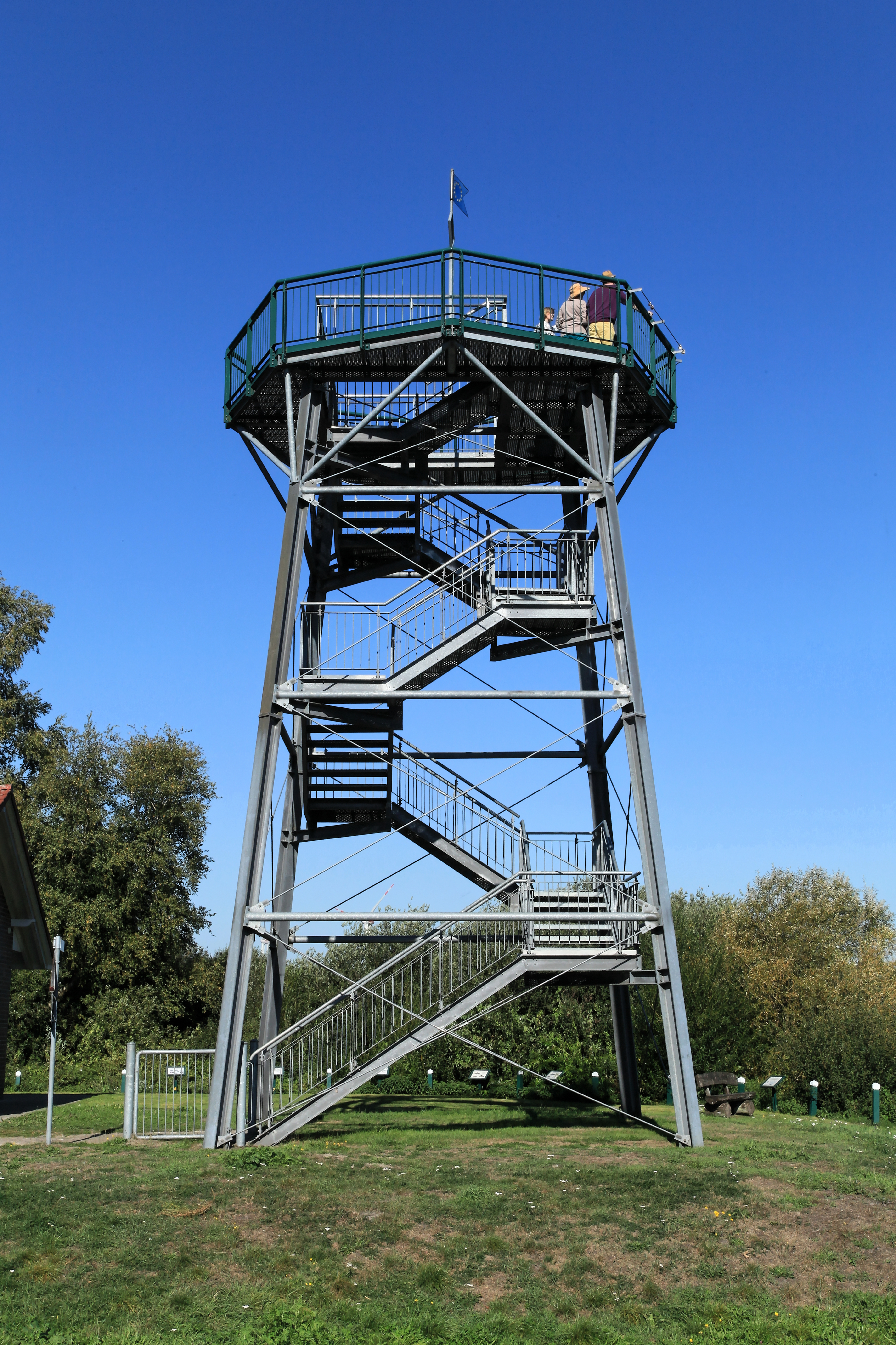 Aussichtsturm vor dem Fischleerpfad, Bootshafen in Barßel